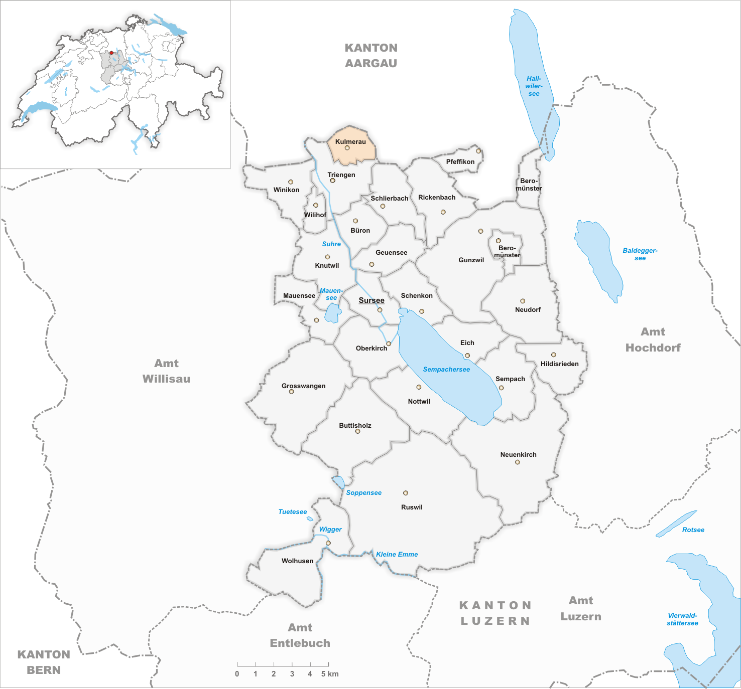 Municipality Kulmerau Artist: Tschubby